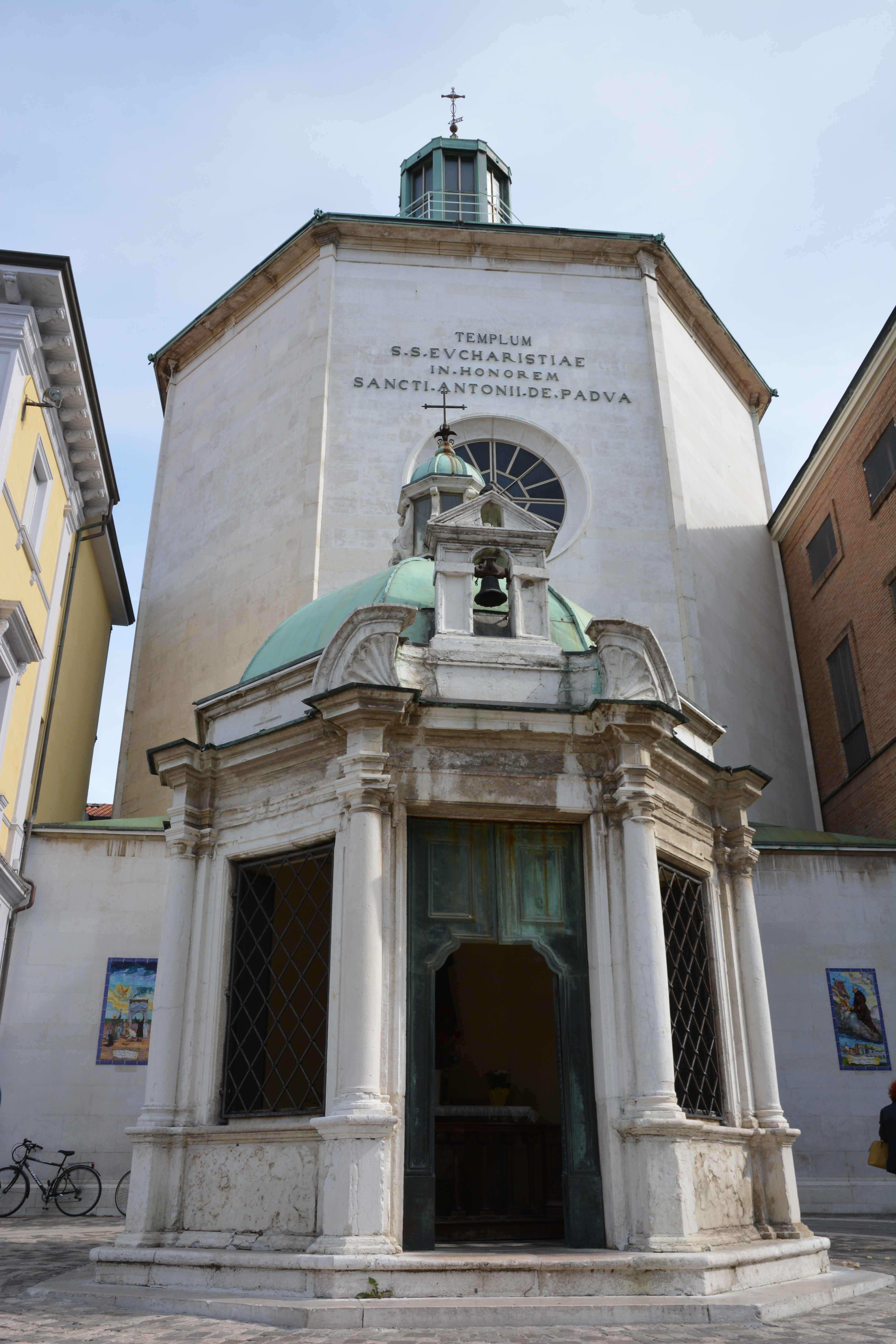 Tempietto di S. Antonio This is a photo of a monument which is part of cultural heritage of Italy.